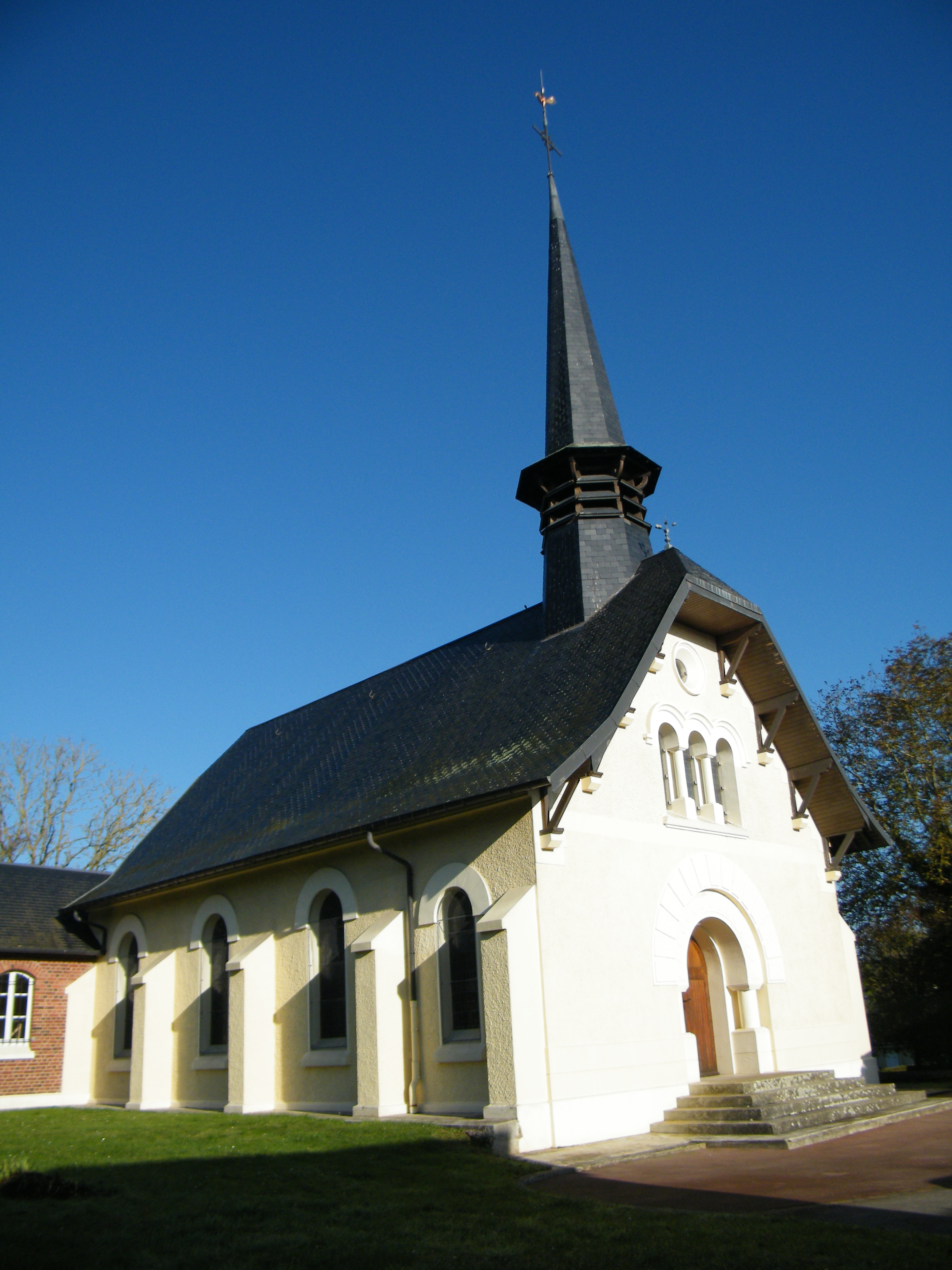 L'église.